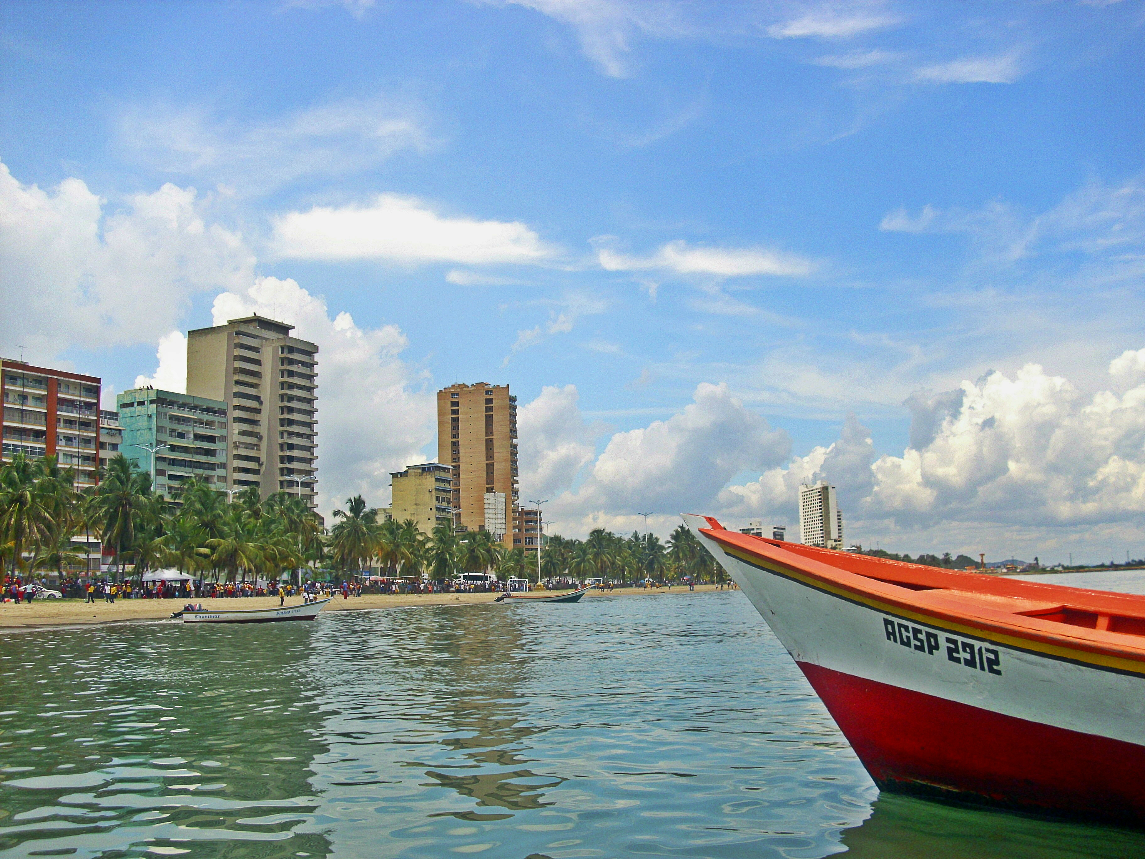 Paseo Colon en el Estado Anzoategui